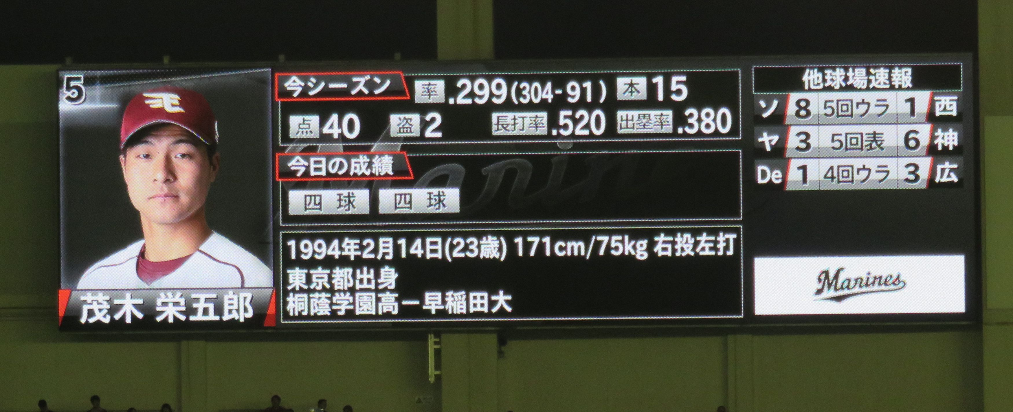 ZOZOマリンスタジアムのレフト側サブスクリーン（2017年撮影）。